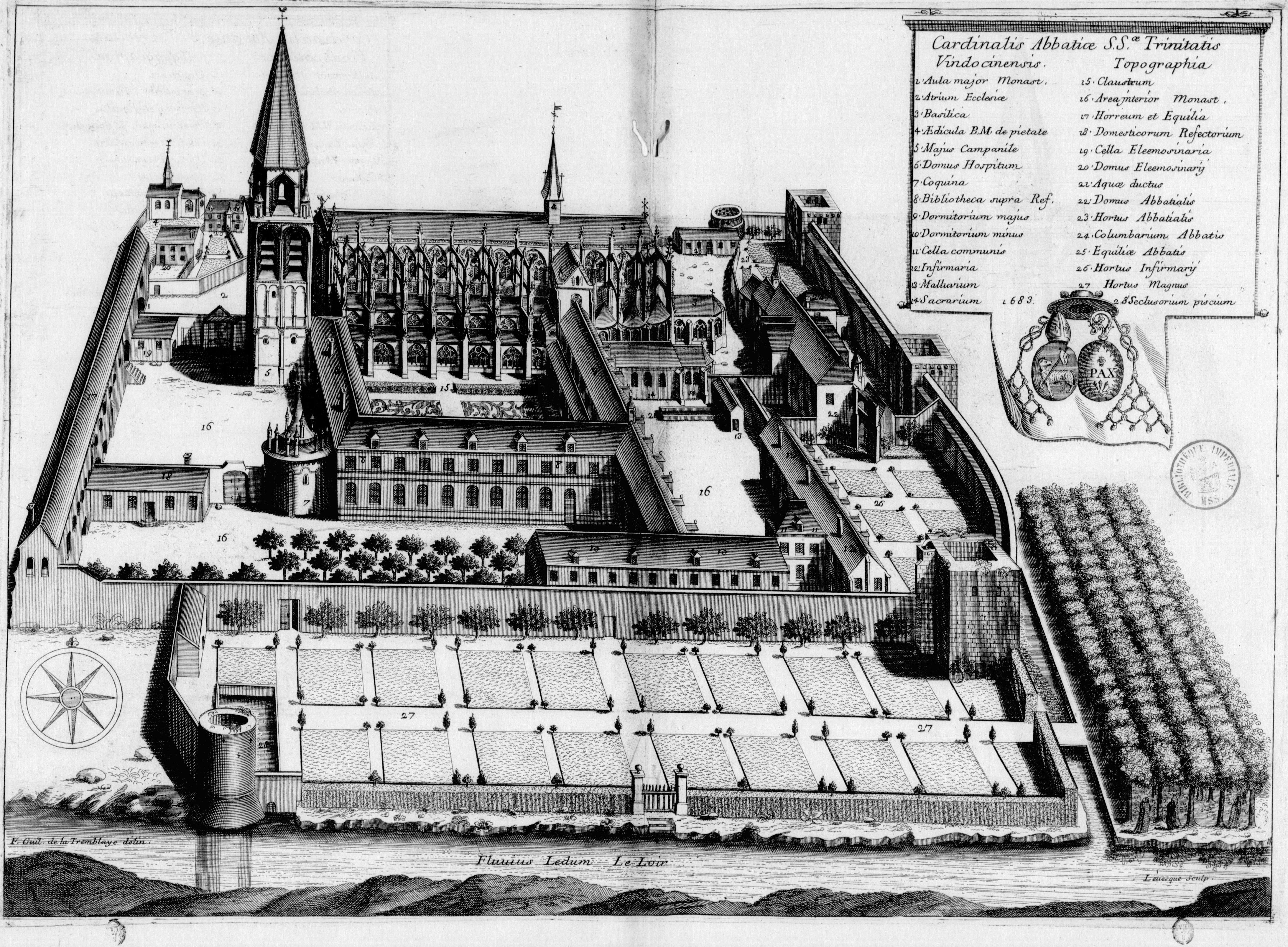 Planche gravée du 17ème siècle représentant l'abbaye de la Trinité de Vendôme, en France, dans le livre Monasticon Gallicanum.